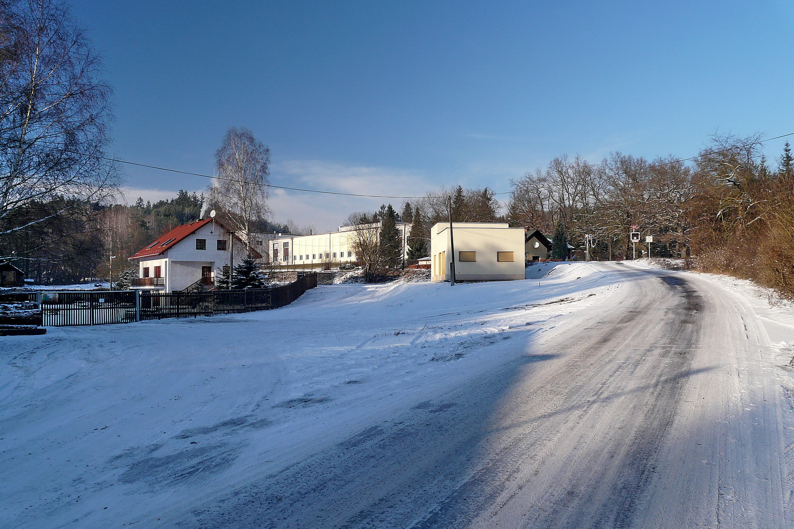 Velký Rečkov